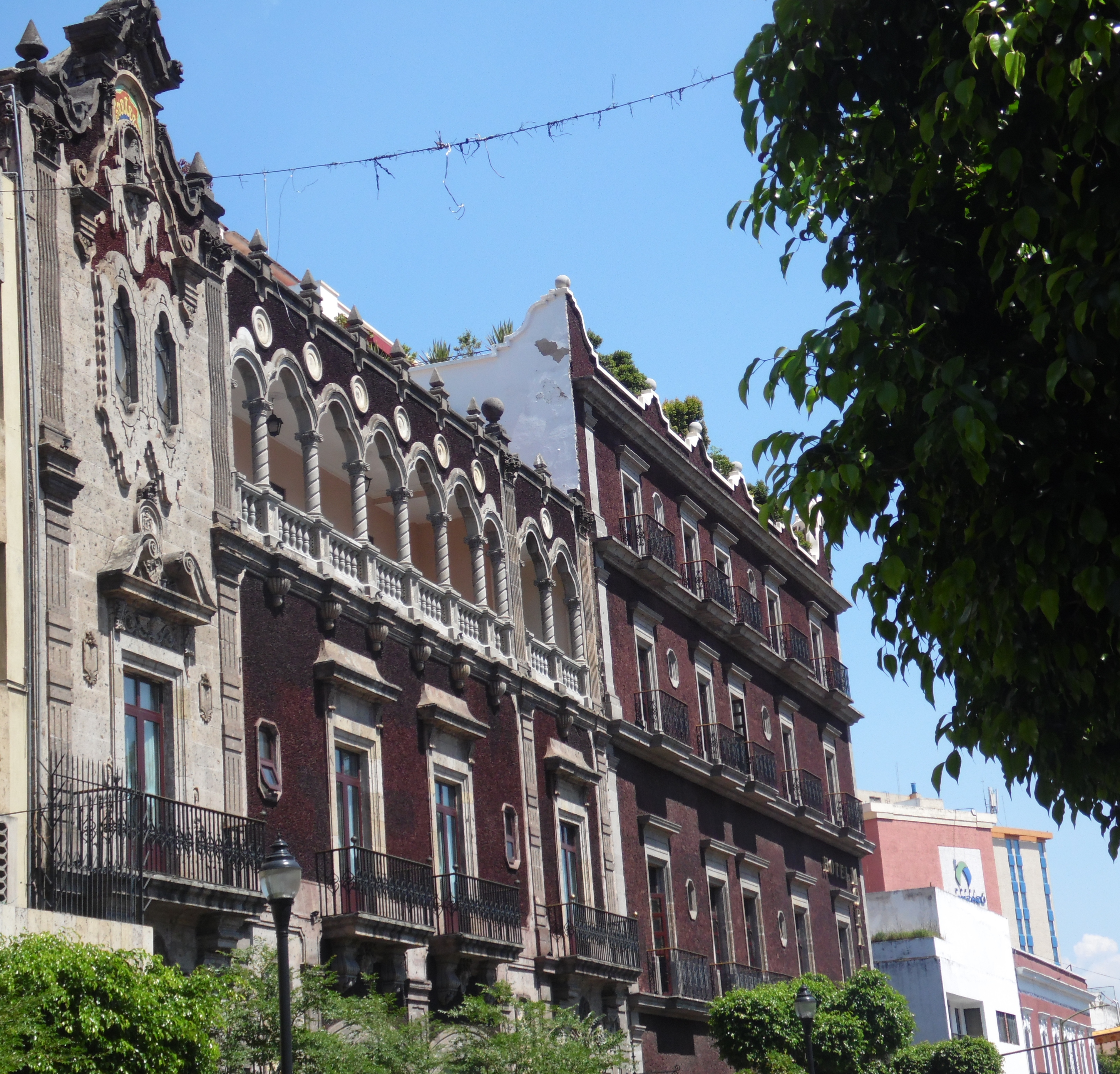 Guadalajara